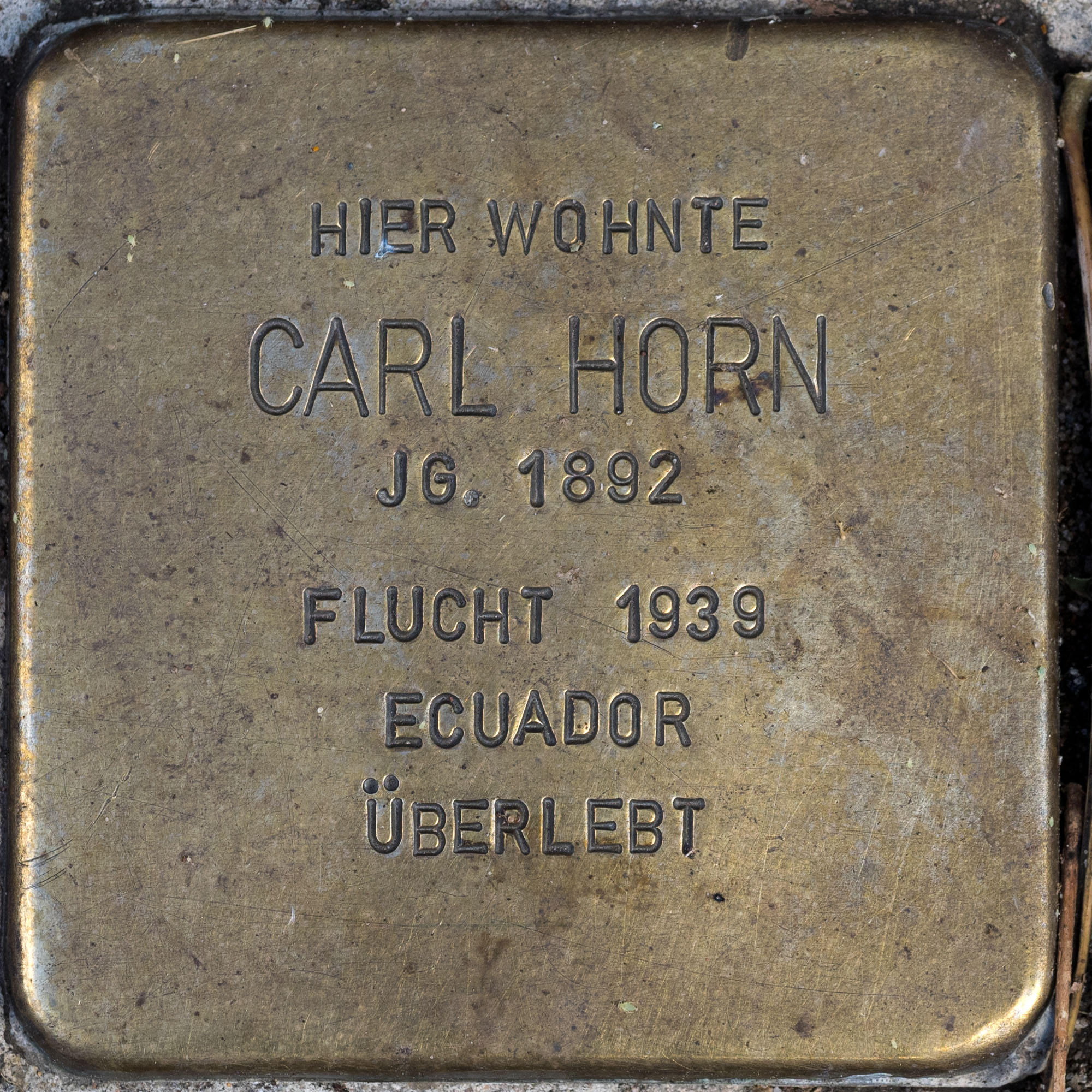 2016 Stolpersteine ToeVo Horn Carl